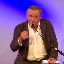 Falk at a book signing in 2007.